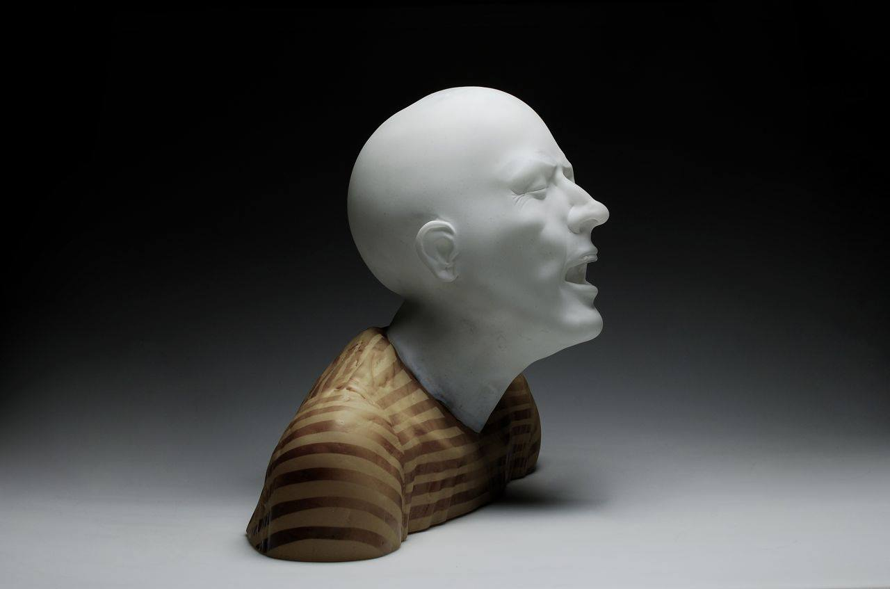 dimensions: 20 x 16 x 12 inches velikost: 51 cm x 40 cm x 30 cm